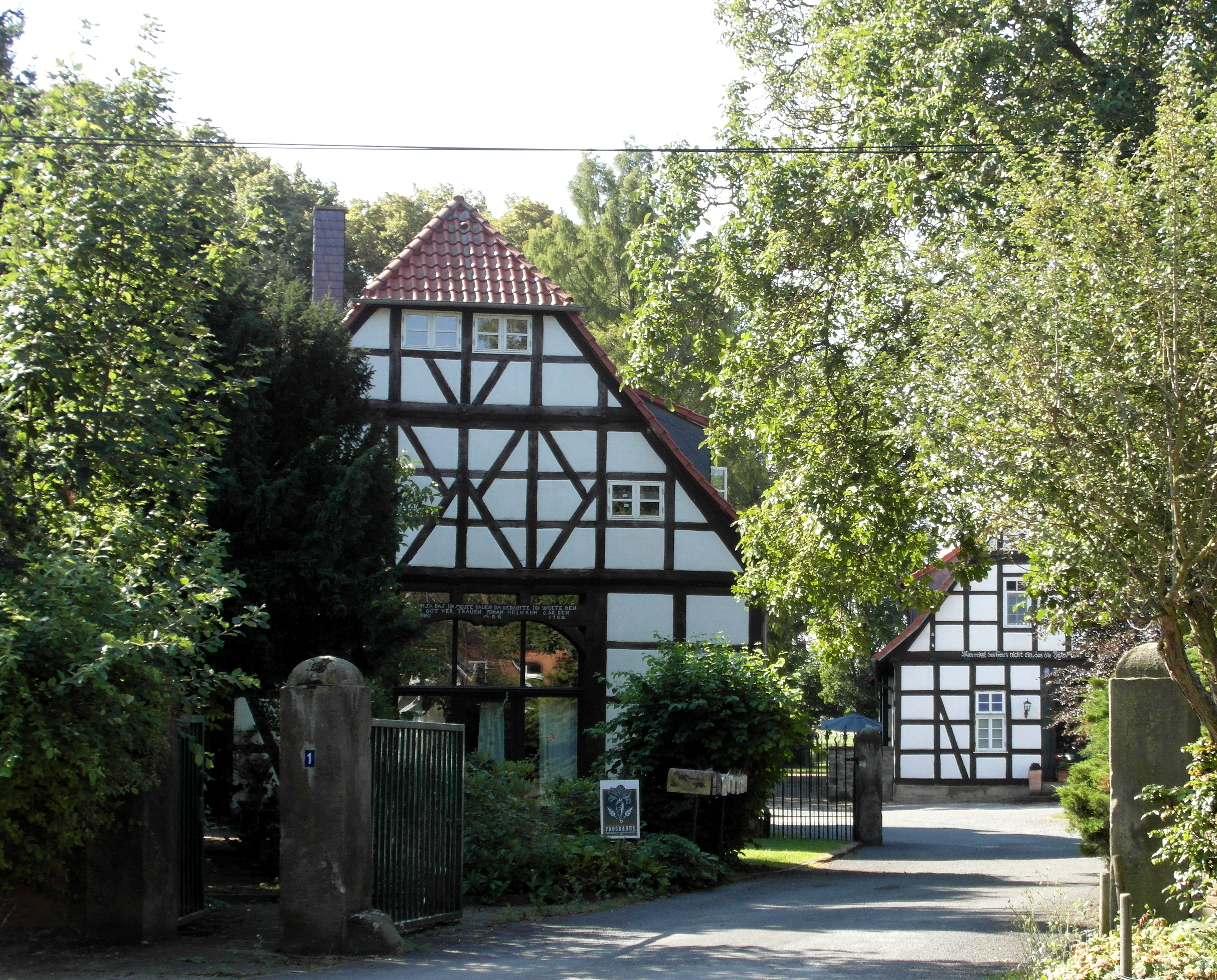 Gehöft Erich-Garben-Straße 1 im Gehrdener Stadtteil Ditterke in der Region Hannover.